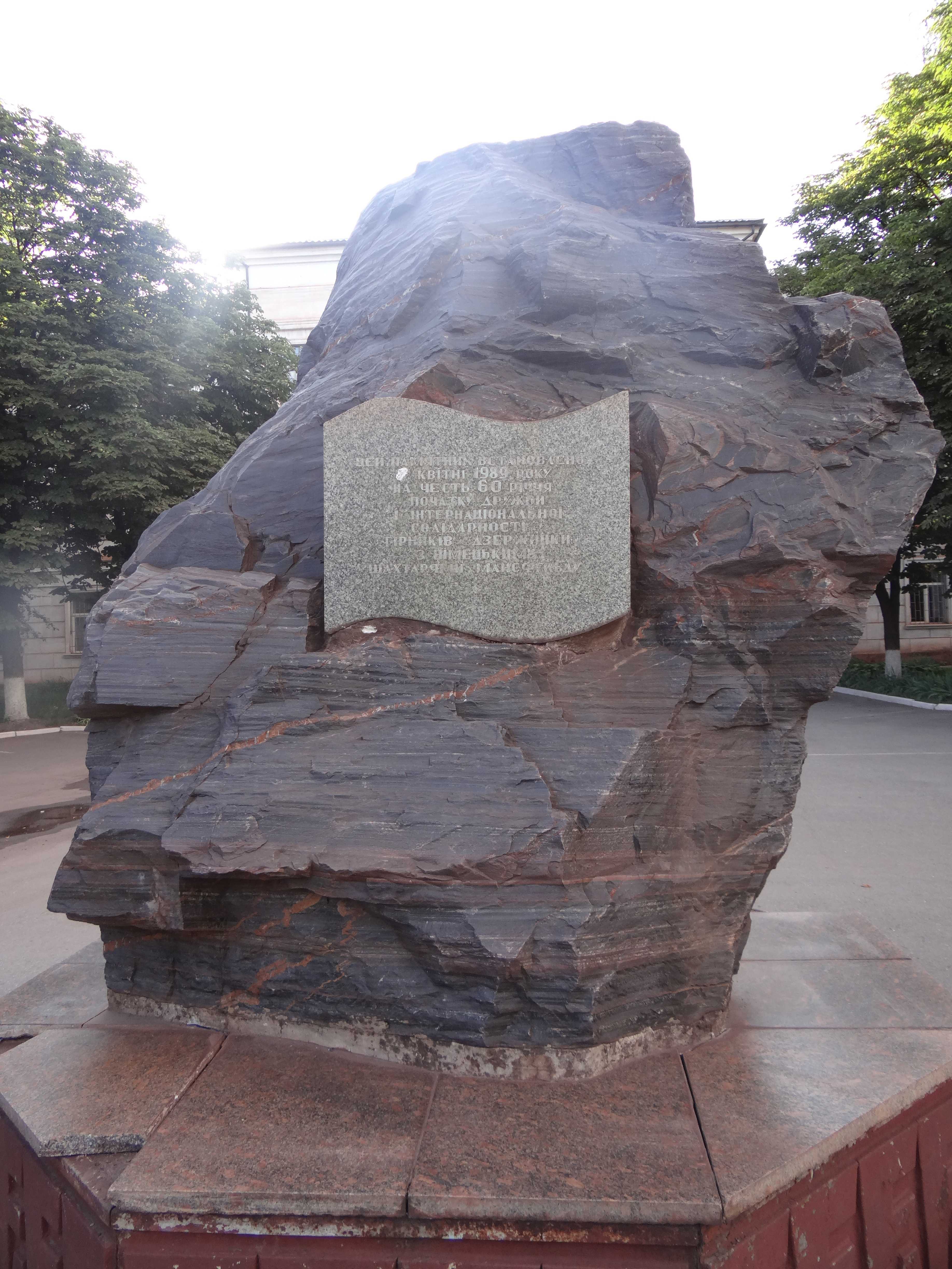 Пам’ятний знак на честь 60-ти річчя інтернаціональної дружби, Кривий Ріг, вул. Дзержинського, 3